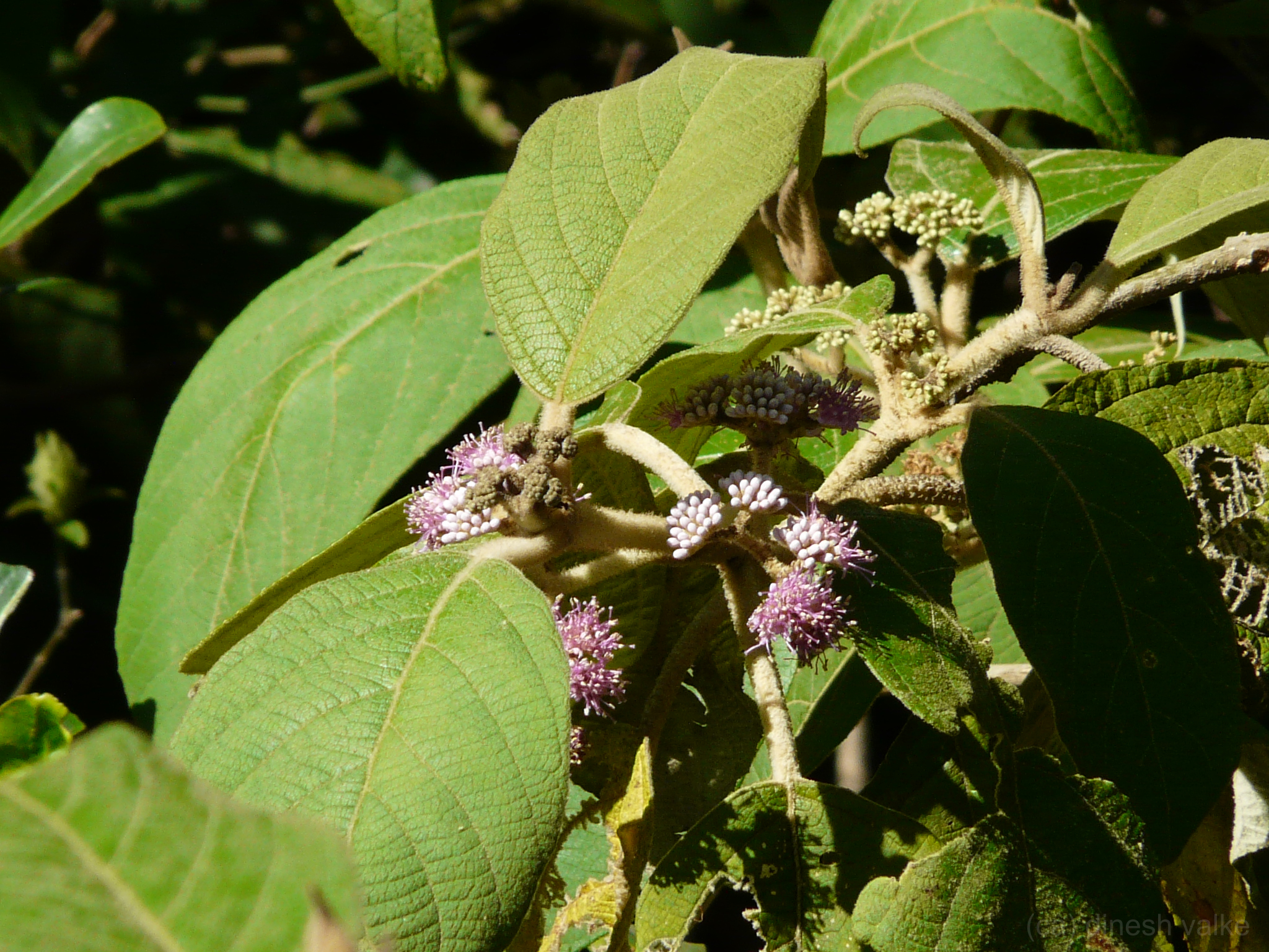 Callicarpa tomentosa